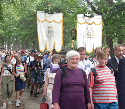 Mariánski pútnici schádzajú po skončení púte z Pútnickej hory v Levoči. (en: Levoca Pilgrimage - pilgrims are leaving the Mariánska hora.)